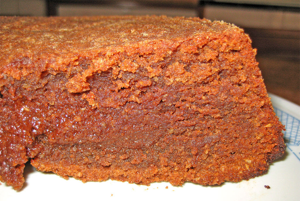 Corso di CasArtusi 27 settembre 2009 Olimpia Apogeo chef pasticcere di Palazzo Albergati (BO) Dolci tentazioni. Le torte di casa Torta caprese